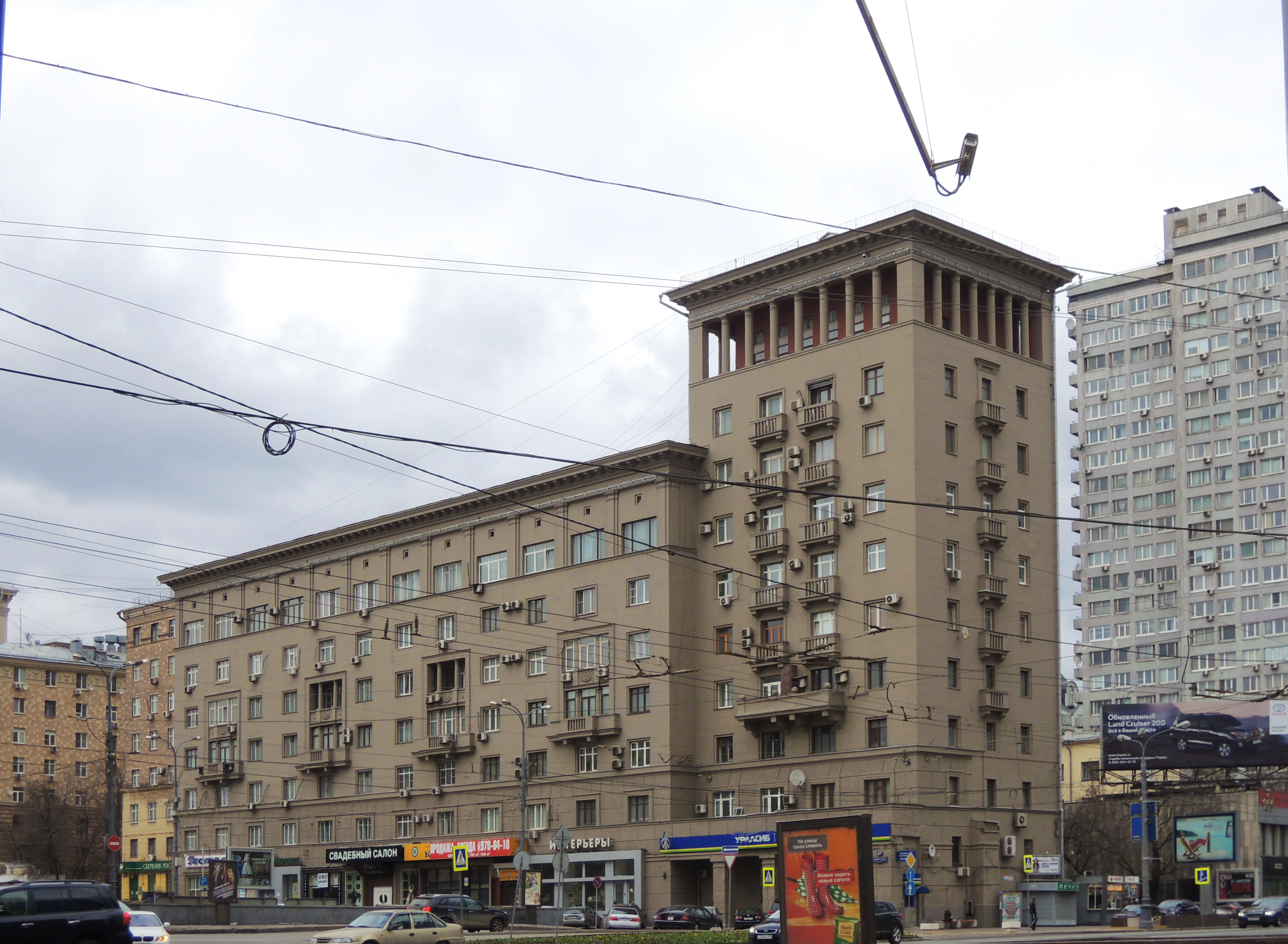 Н. Арбат